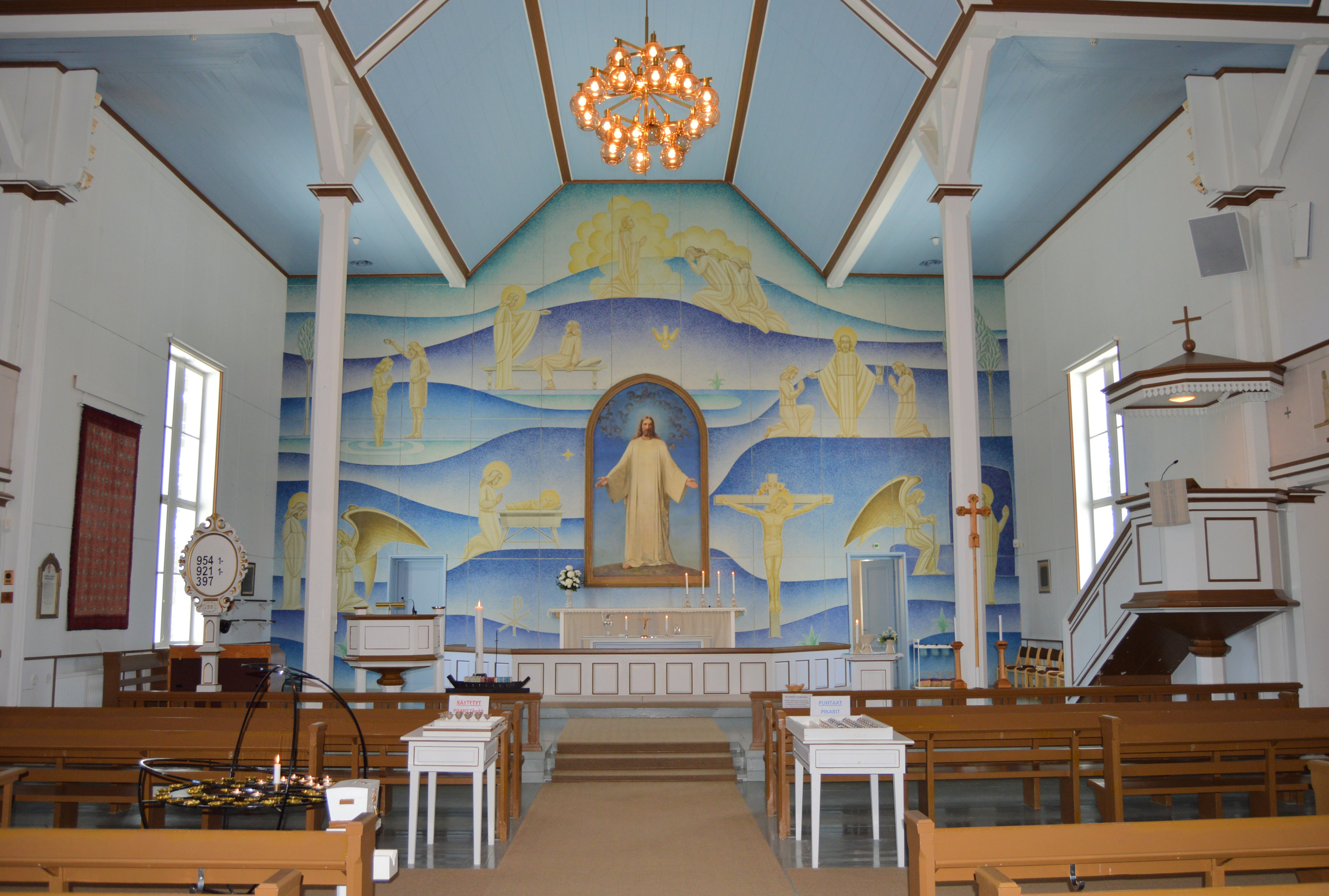 Polvijärven kirkko sisältä